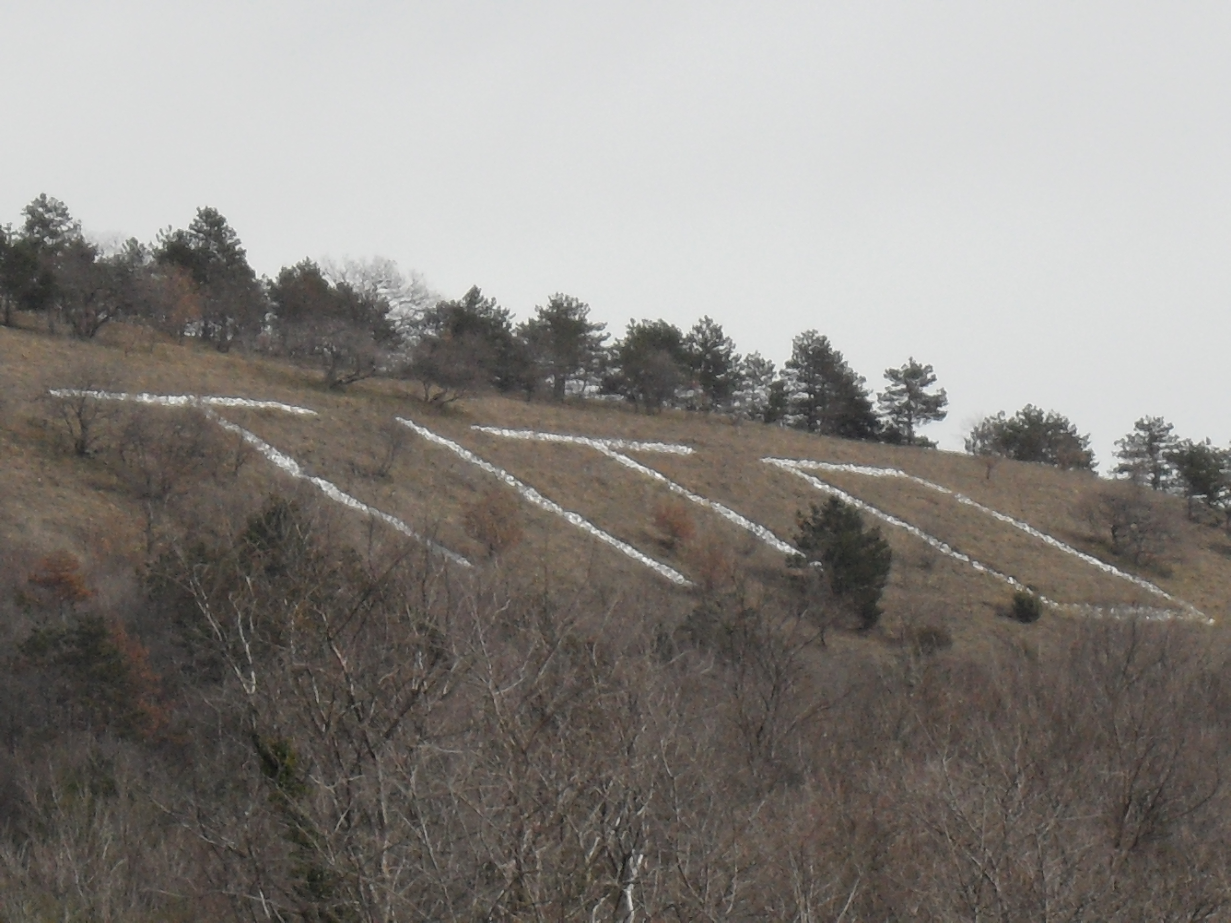 Napis Tito na hribu nad Dekani